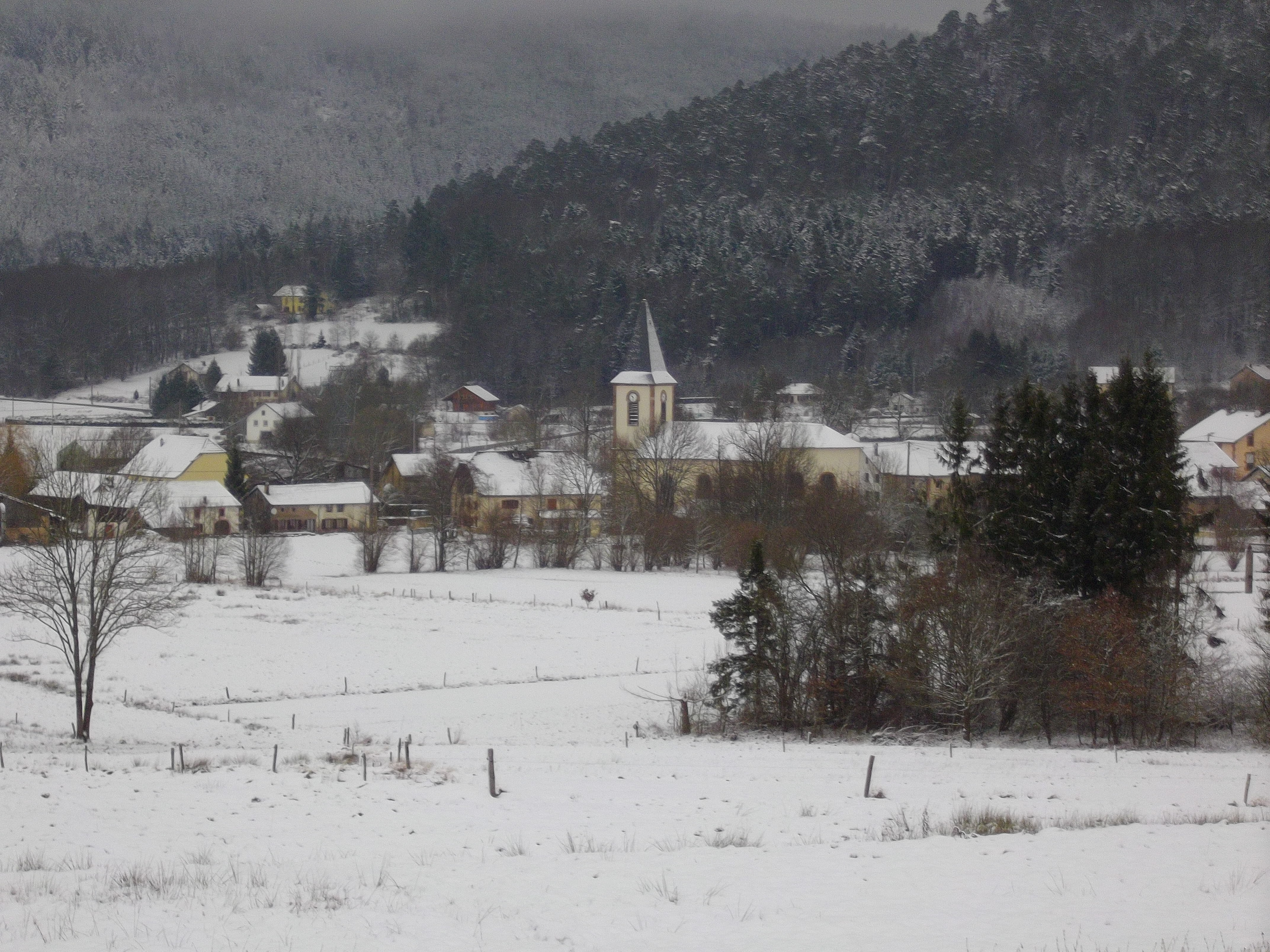 LA HOUSSIERE sous la neige